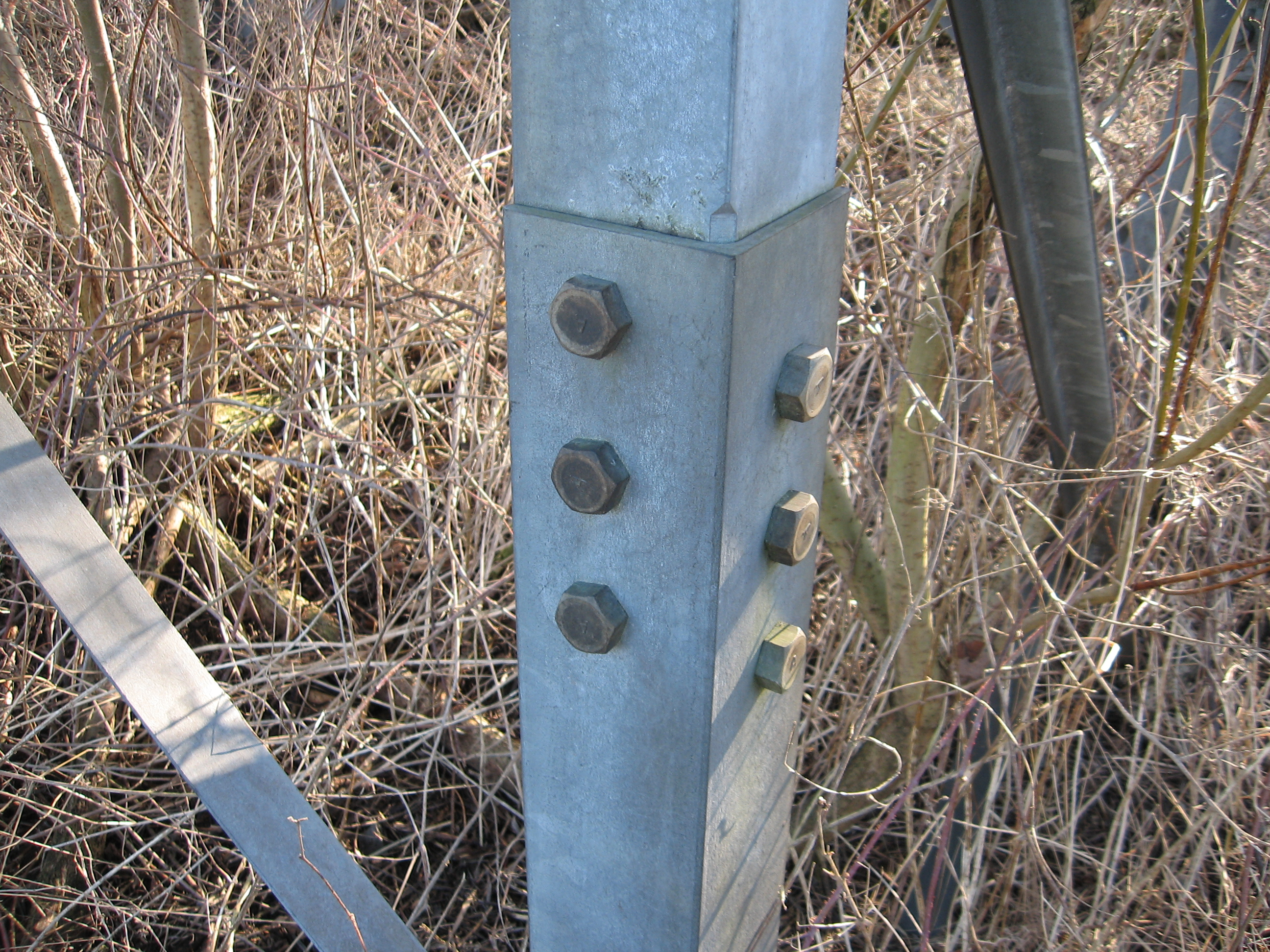 Bultförband